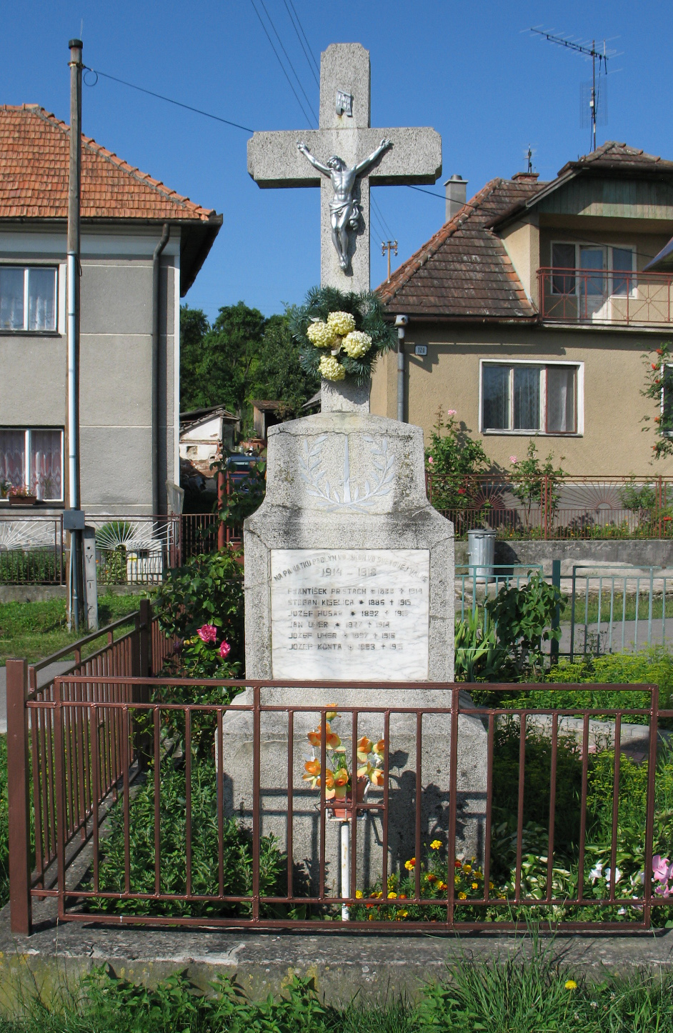 Pamätník, z roku 1930, v obci Trenčianske Mitice, je venovaný vojakom, ktorí zahynuli na frontoch prvej svetovej vojne